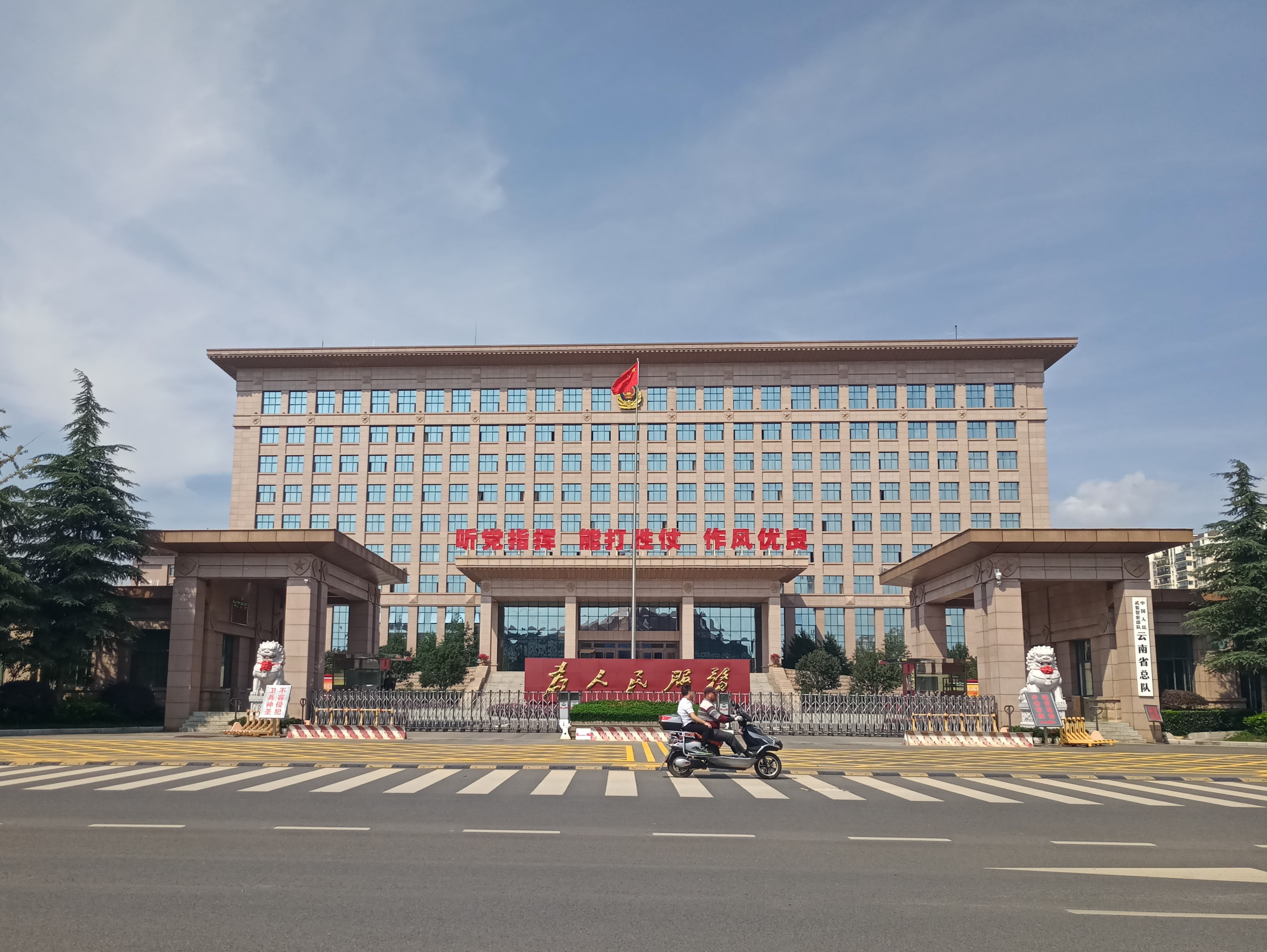 中文（中国大陆）: 云南省武警总队